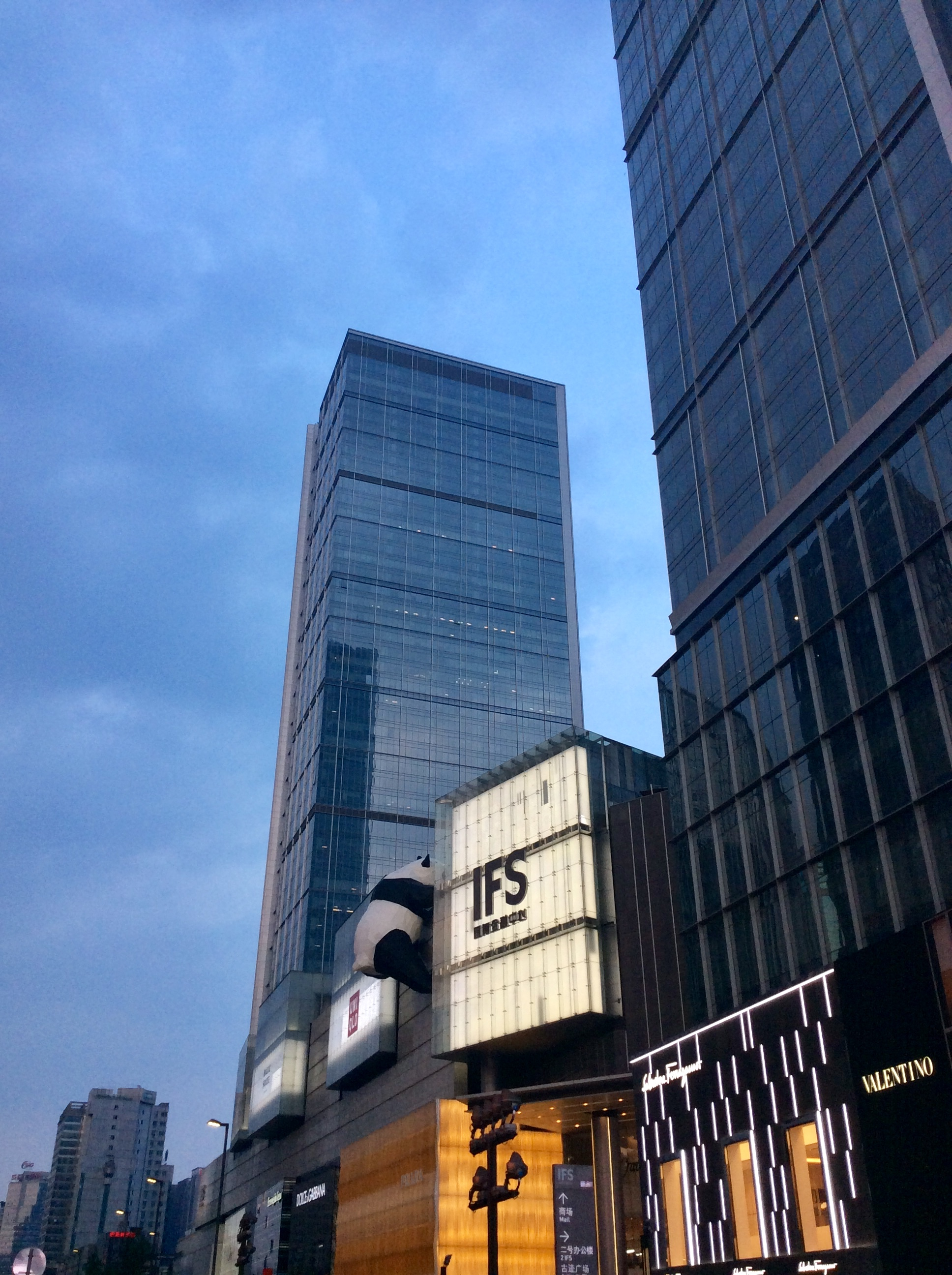 成都国际金融中心在红星路一侧的奢侈品牌店面、办公塔楼、艺术雕塑和商场入口夜景